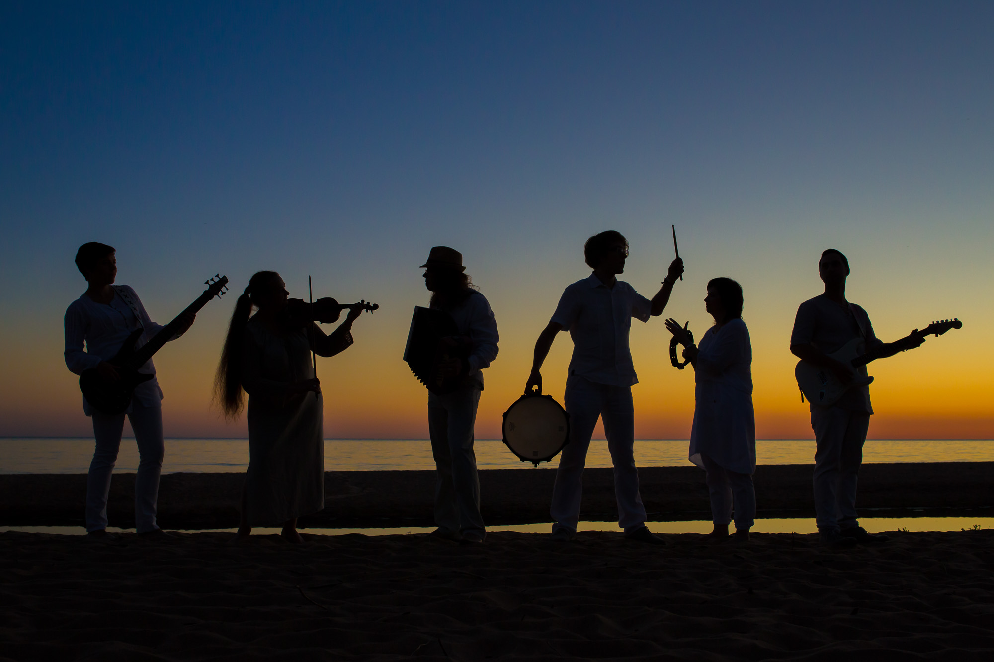 Laimas Muzykanti 2015. gadā